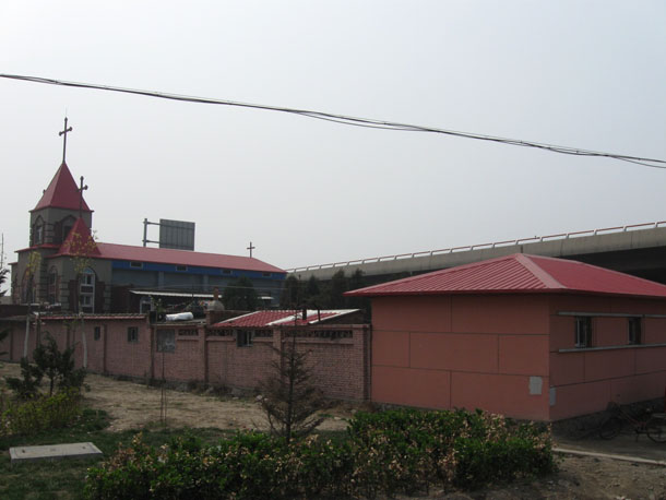 中心桥耶稣圣心教堂。